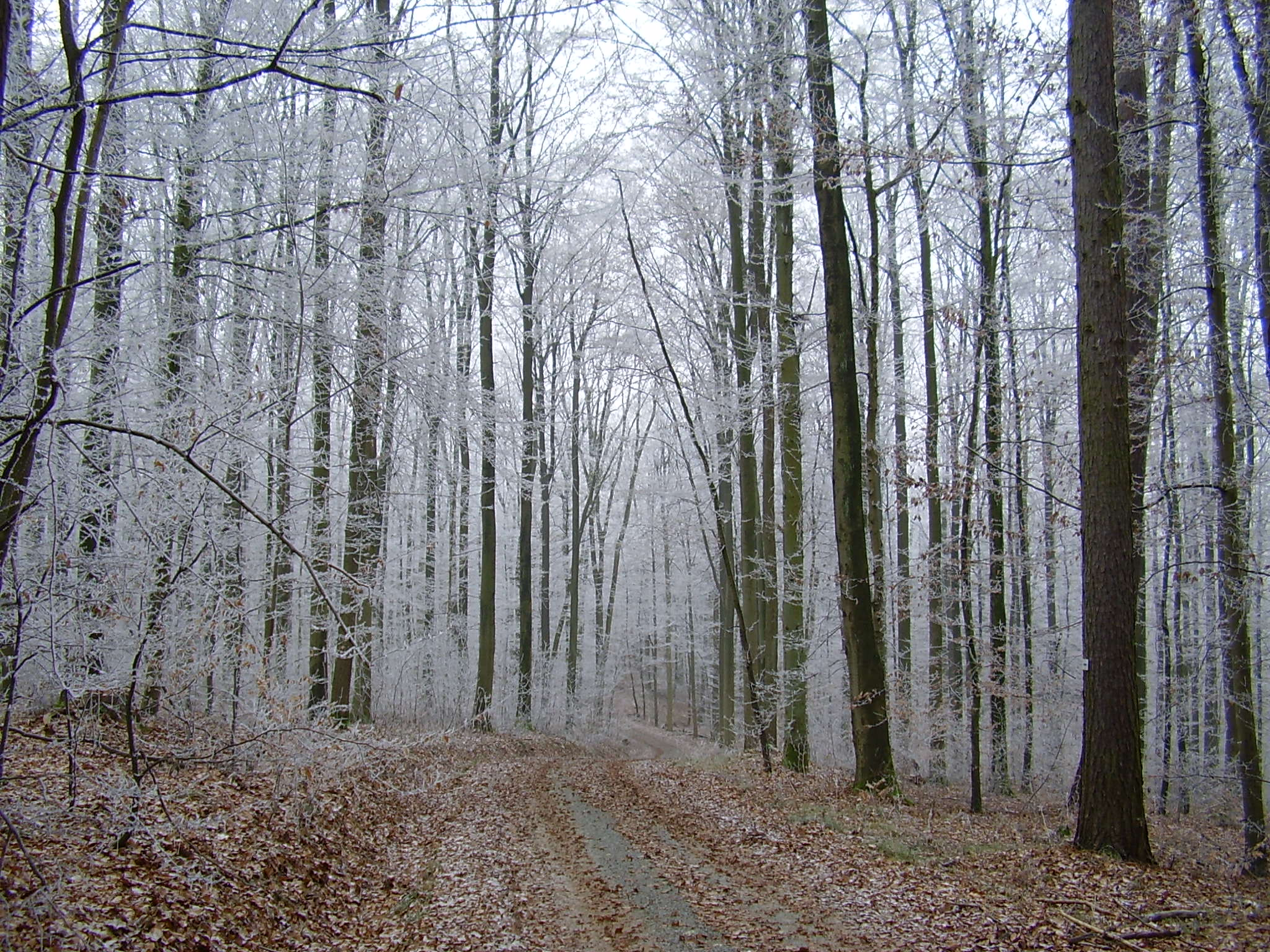 Der Harthäuser Wald bei Möckmühl im Dezember.